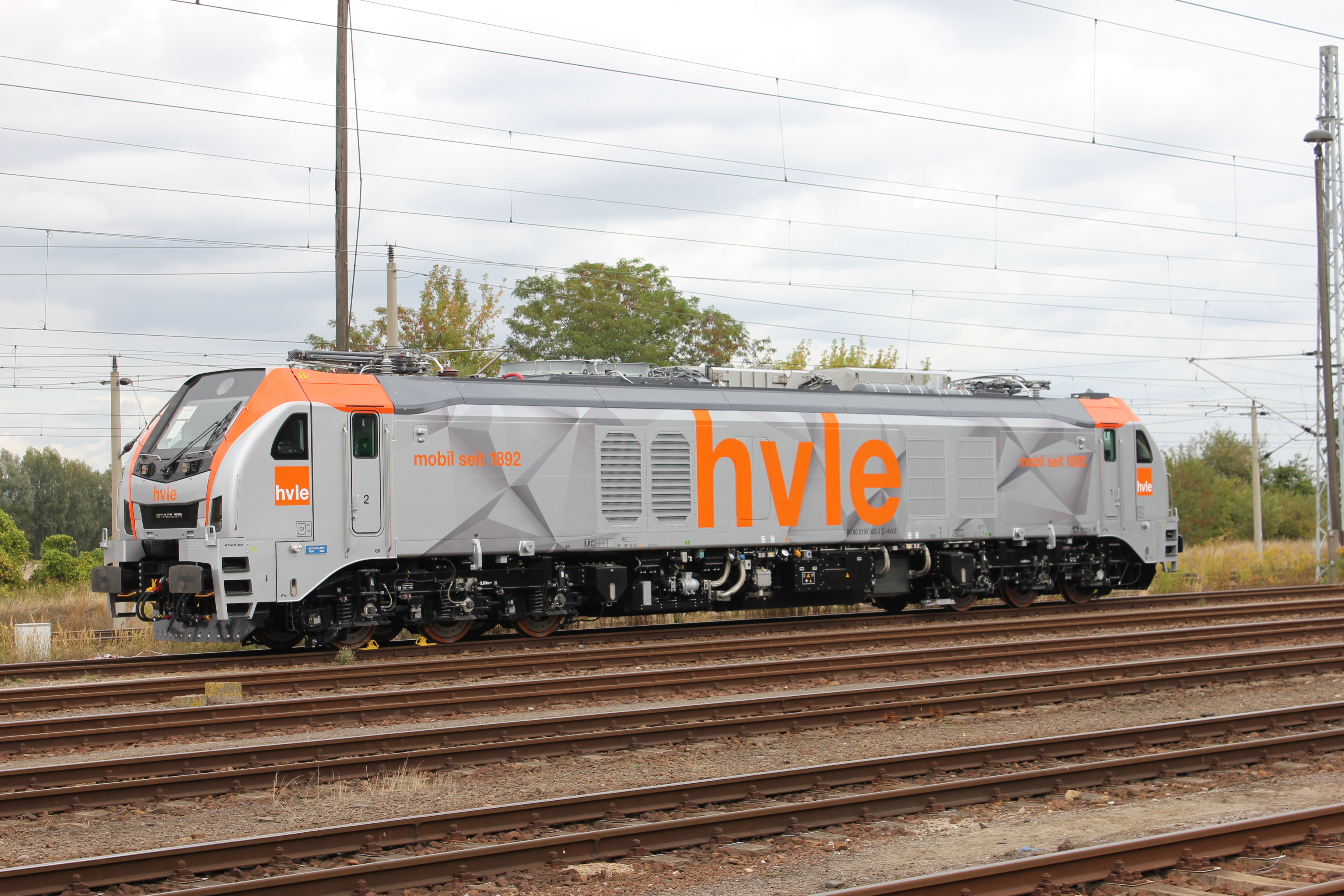 neues Design in Wustermark